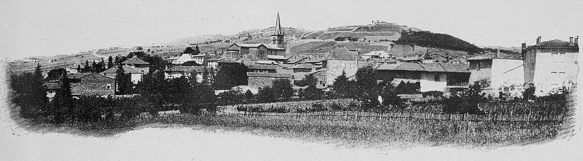 Dictionnaire illustré des communes du département du Rhône. Tome 1 / par MM. E. de Rolland et D. Clouzet.